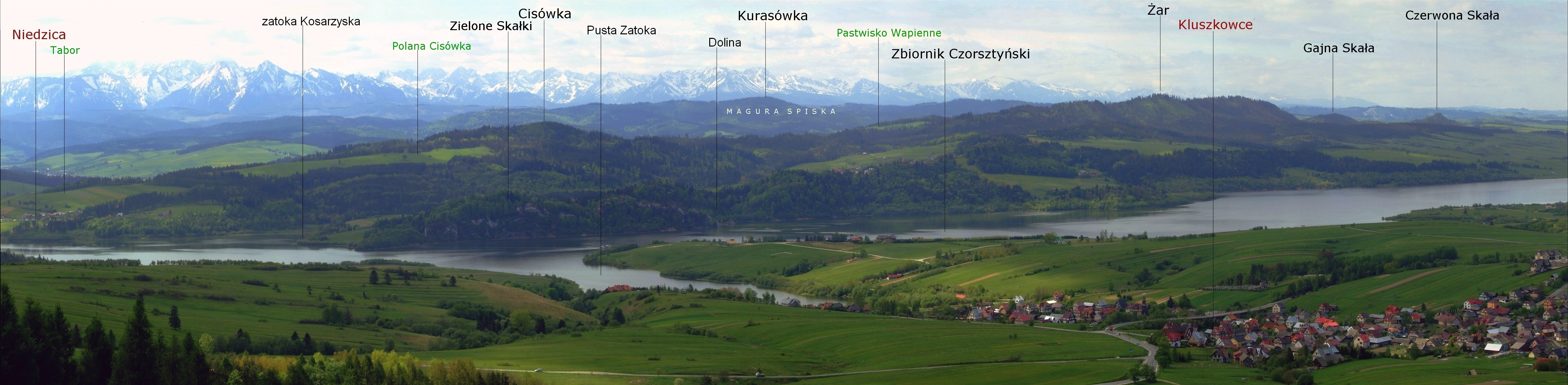 Widok z góry Wdżar na Pieniny Spiskie i Tatry